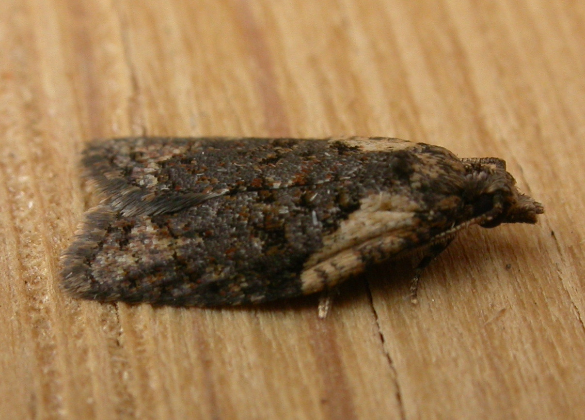 Capua intractana (Walker, 1869). Image taken at Aranda, Canberra (Australia).